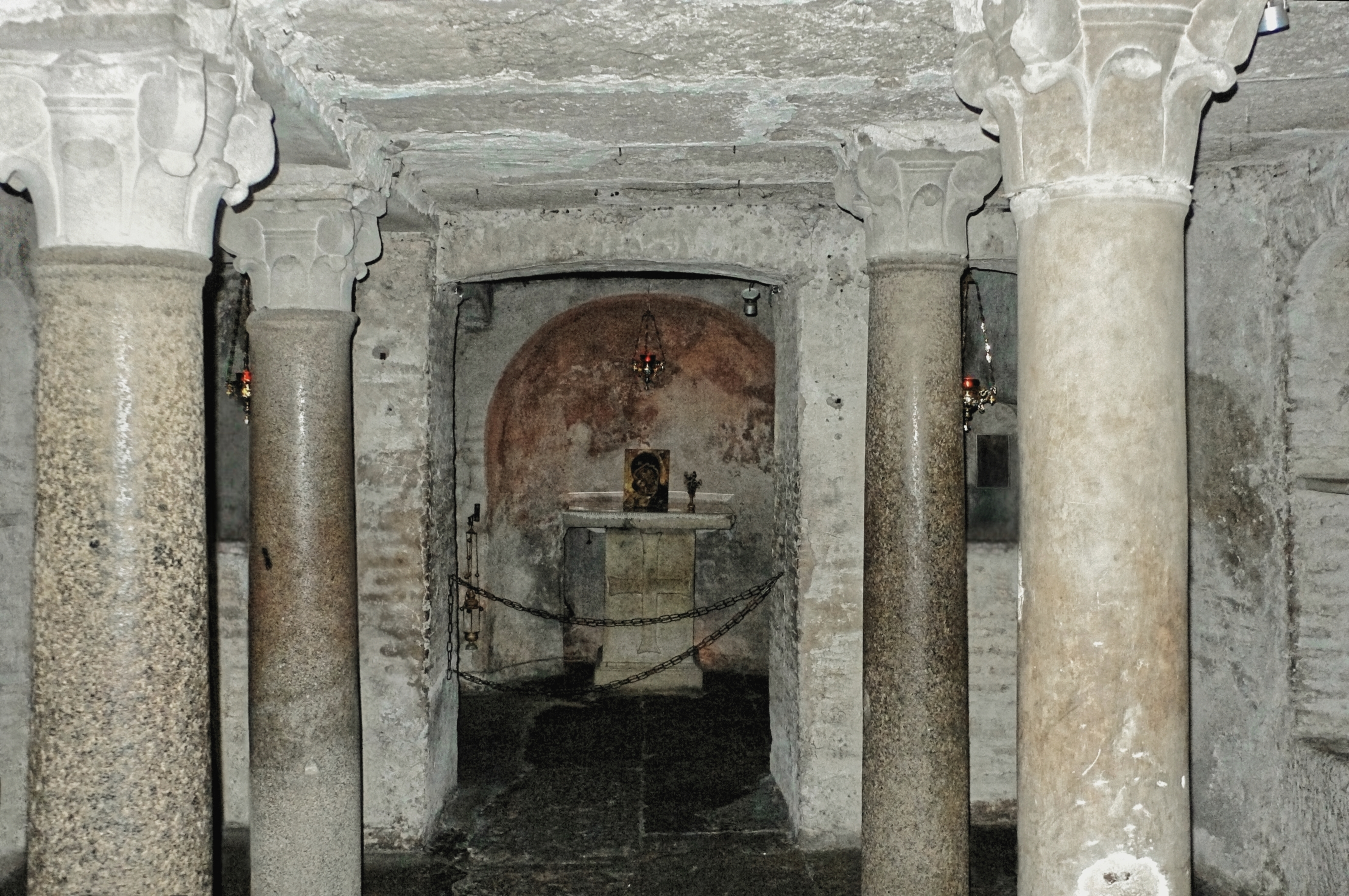 Die Krypta der Kirche aus dem 8. Jh. mit Spoliensäulen und halbrunder Apsis. Hier ist das Grab des Märtyrers Pancratius.